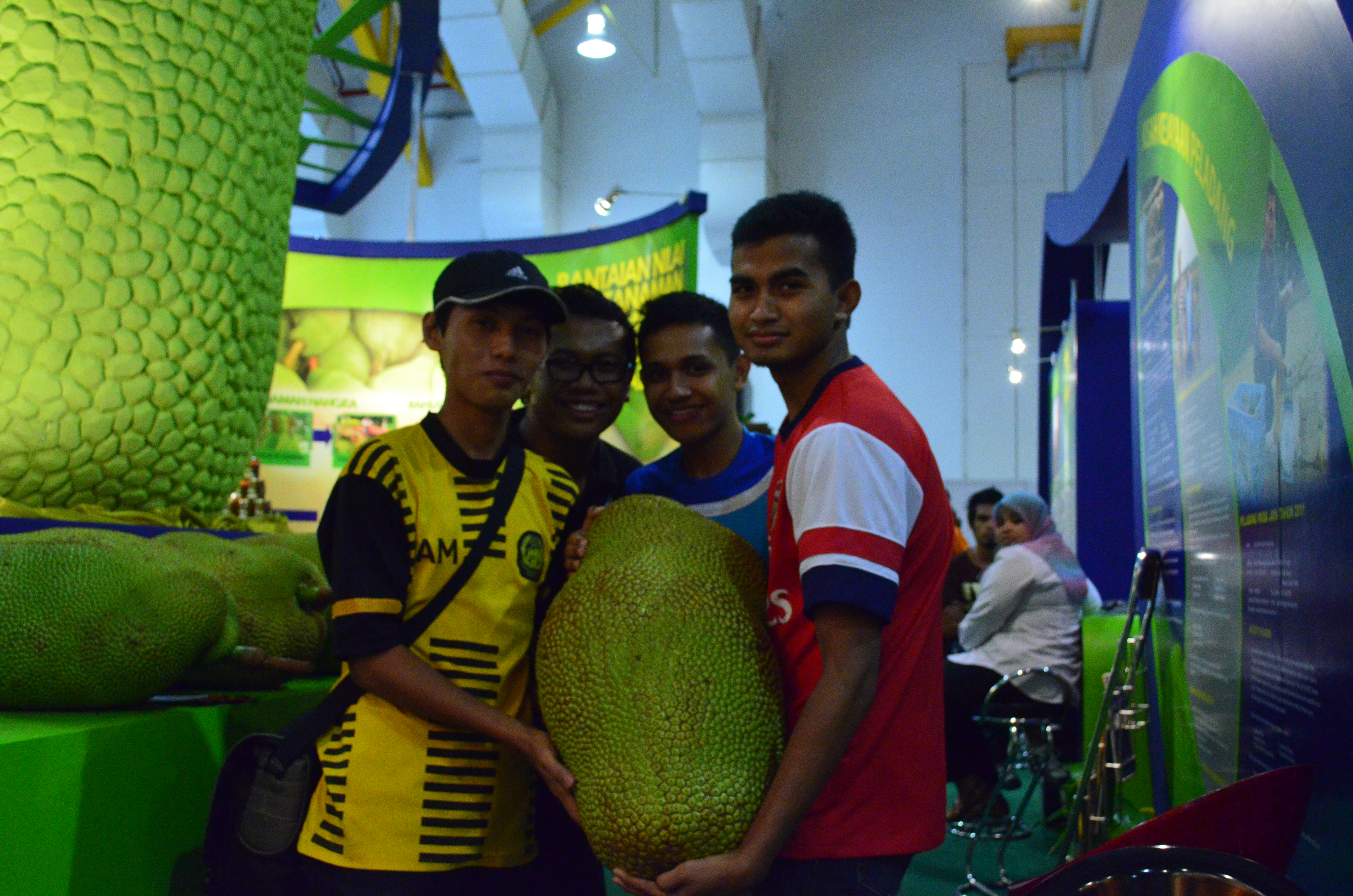 Saiz nangka madu SJ-USM 2000 di pameran MAHA 2012.